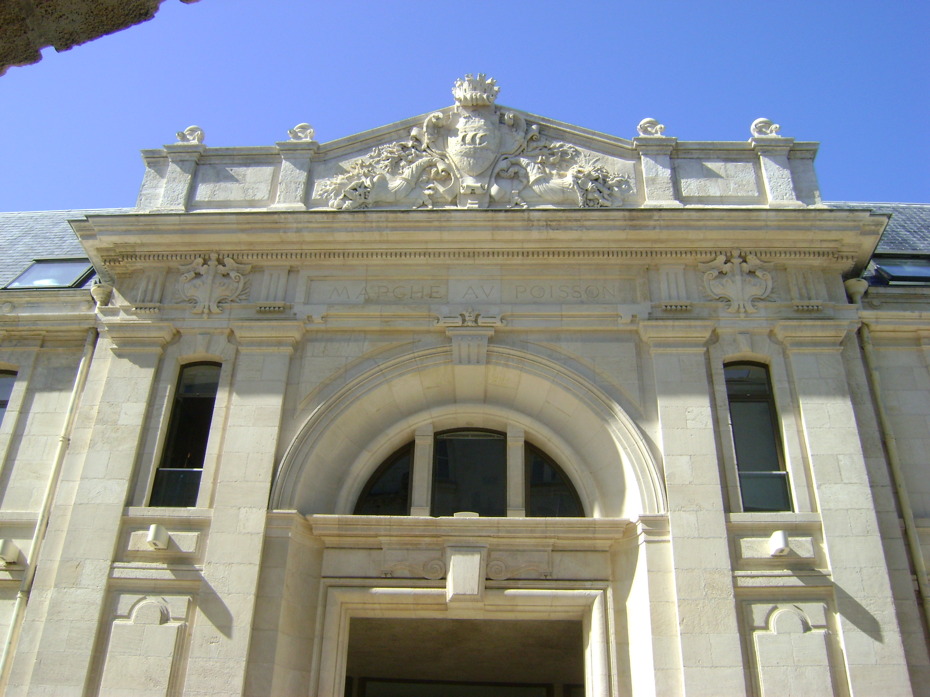 Ancien couvent des Carmes de la Rochelle. Devenu marché au poissons et aujourd'hui salle de spectacle La Coursive